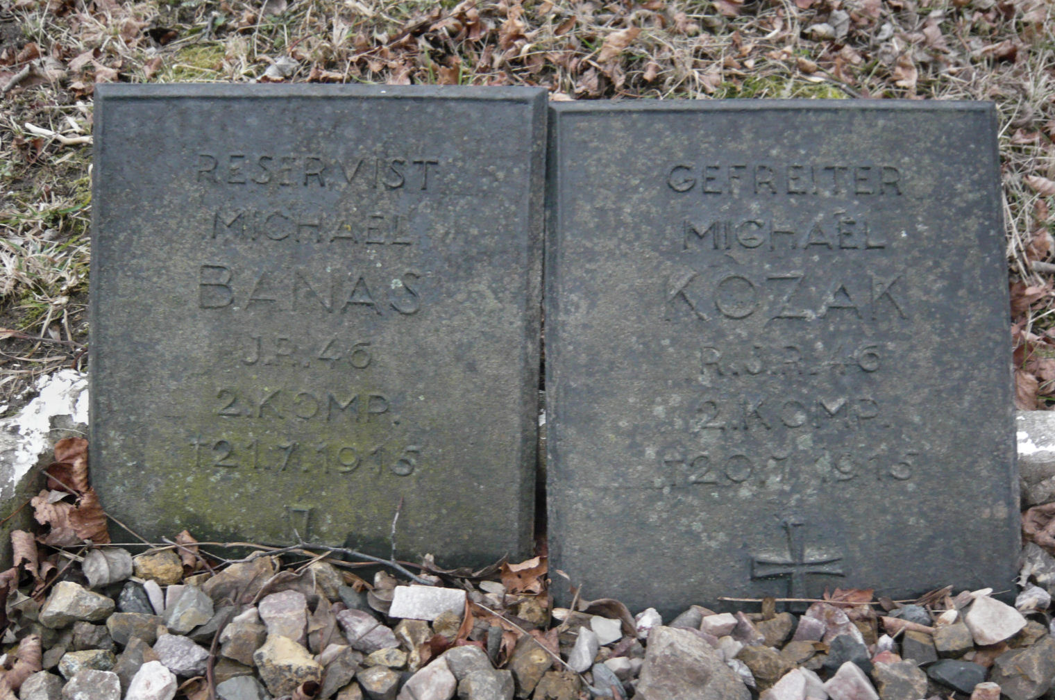 Cmentarz wojenny w Dziecininie